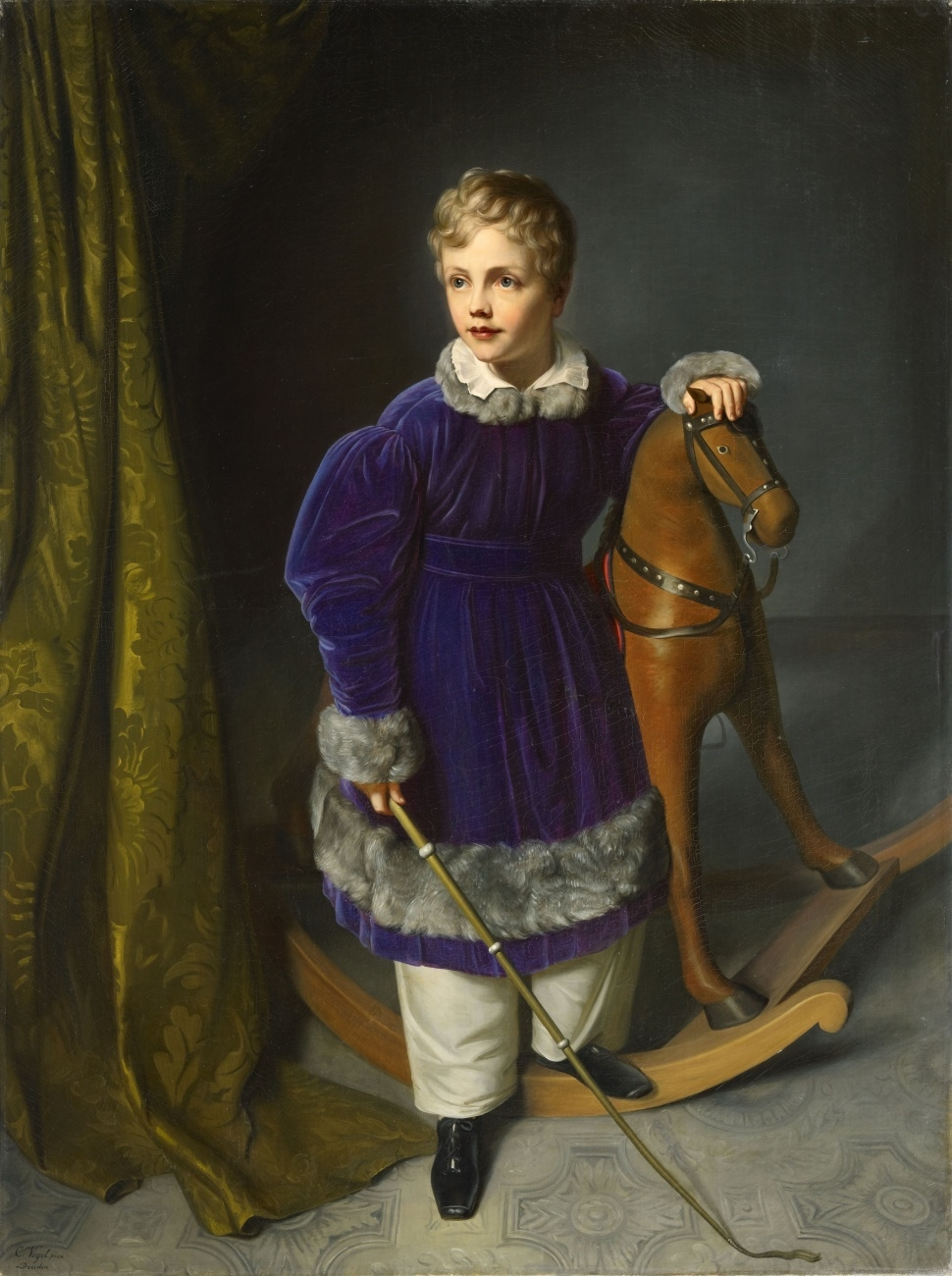 König Albert von Sachsen als Kind. Öl auf Leinwand (doubliert). 130 x 97 cm. Signiert unten links: C. Vogel pinx Dresden